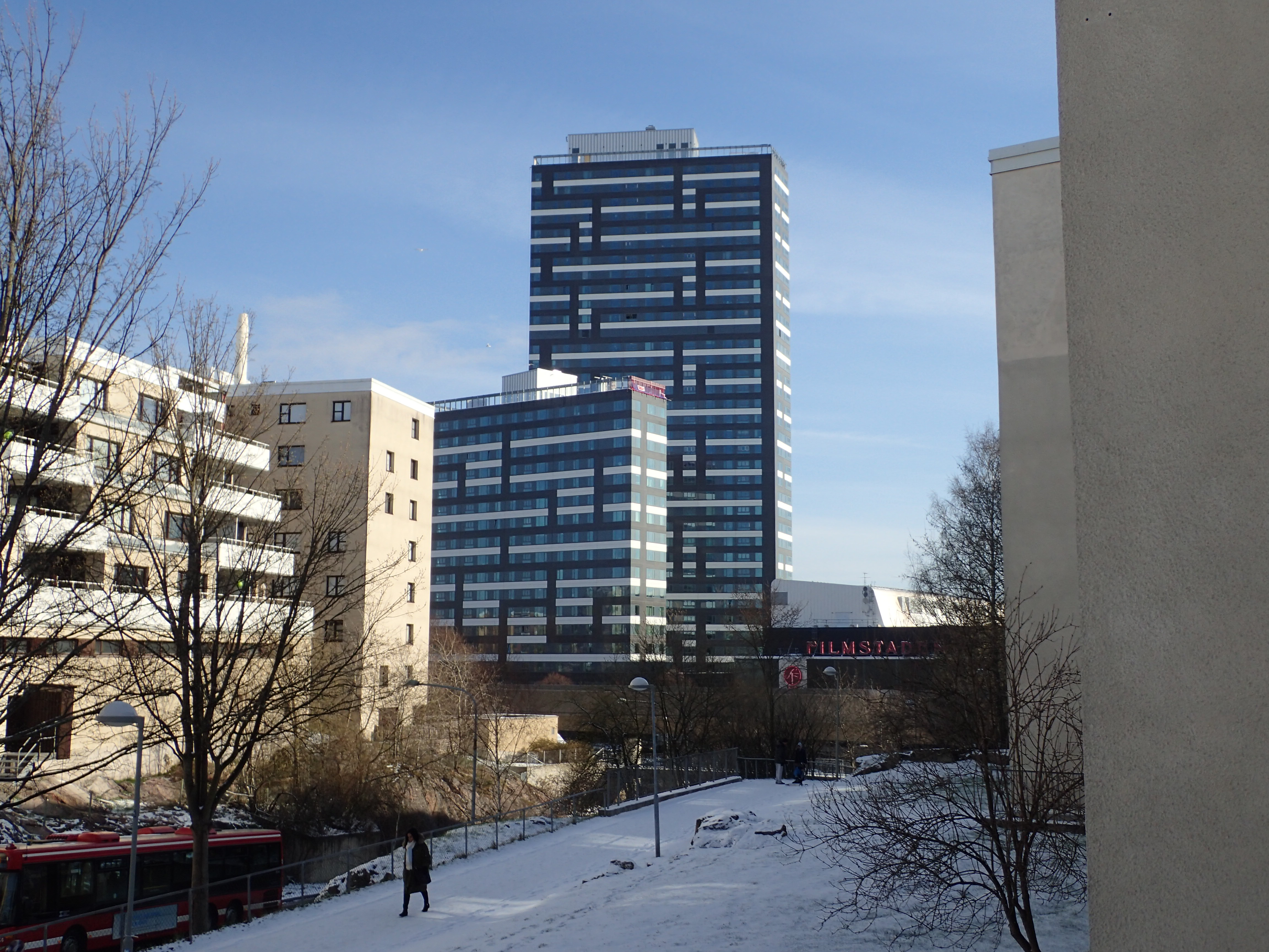 Kista flerbostadsområde. Byggnadsår 1974-1980. Arkitekter Höjer & Ljungqvist